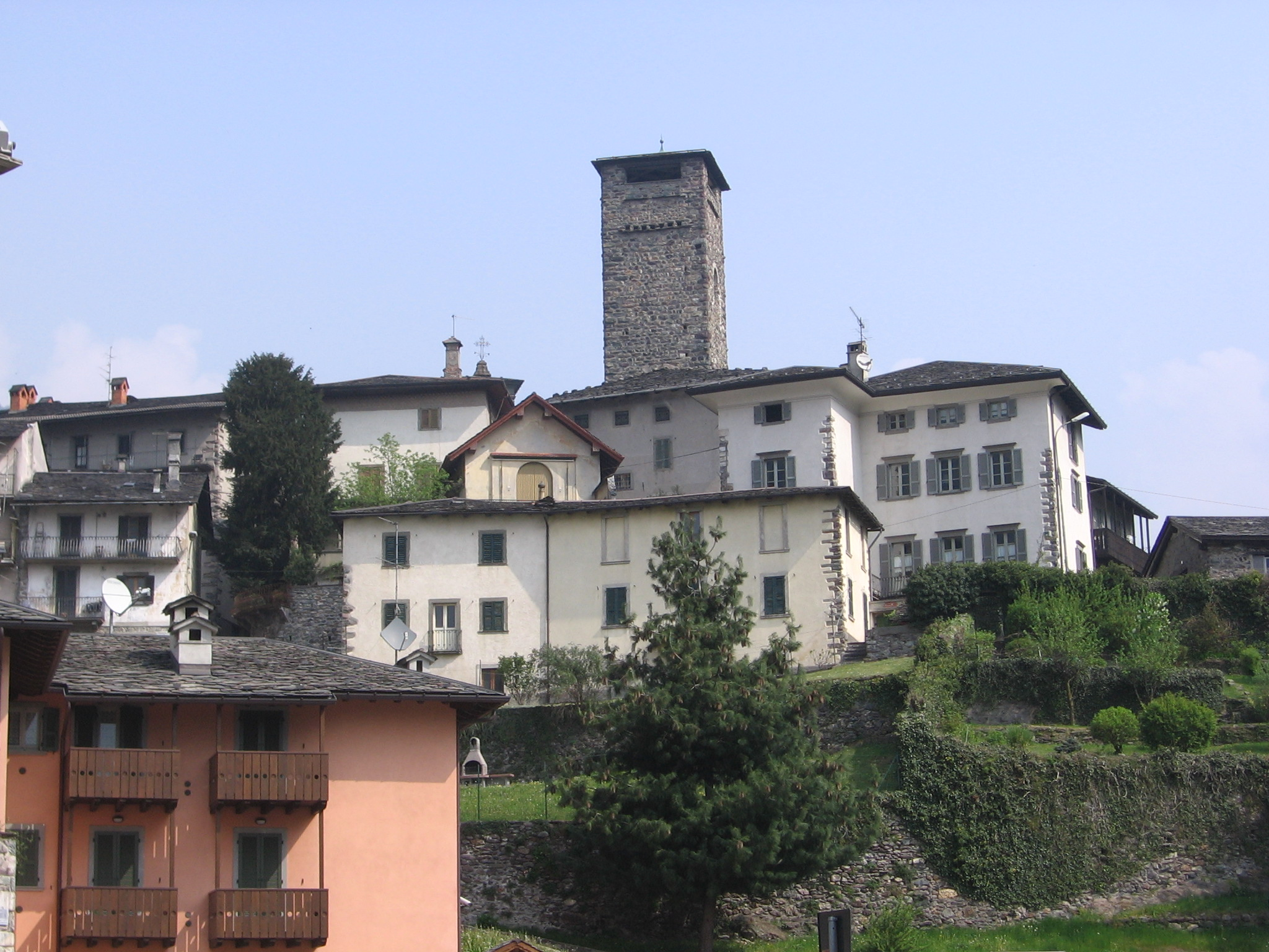 Gromo, Bergamo, Italia